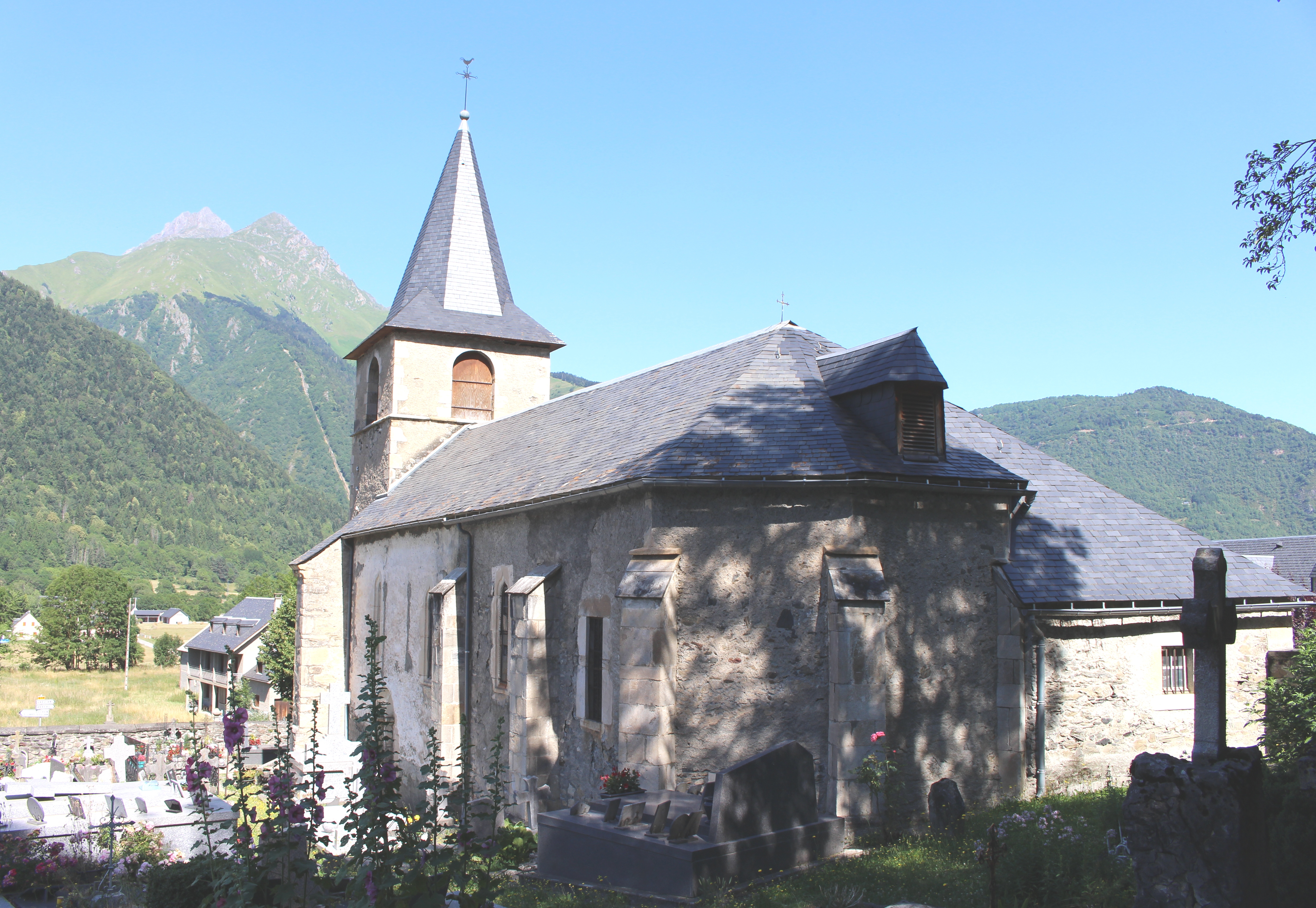 Église Saint-Michel de Bazus-Aure (Hautes-Pyrénées)